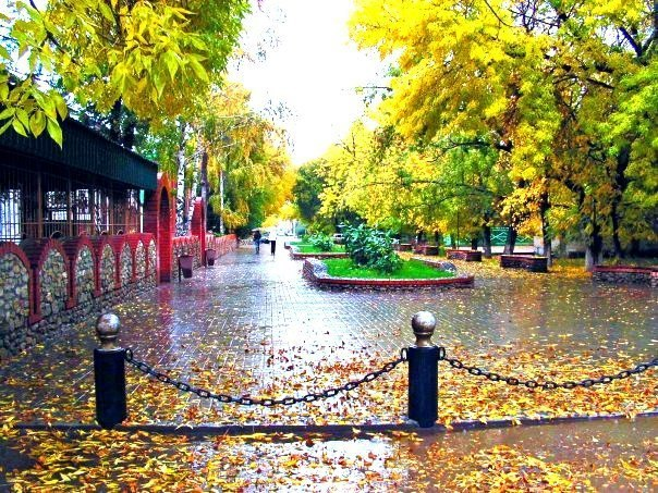 Русский